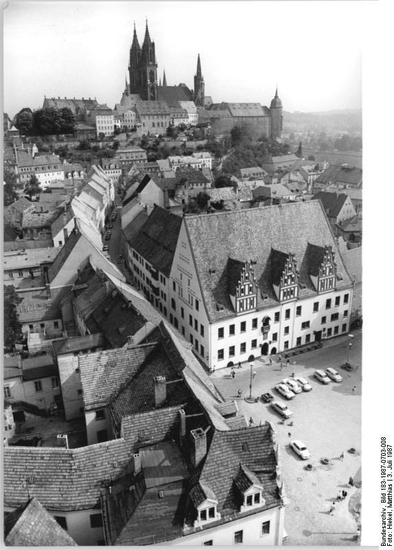 Meißen, Markt, Rathaus, Albrechtsburg, Dom ADN-ZB Hiekel 3.7.87 Bez. Dresden: Dieser Blick aus 42 m Höhe auf das Zentrum der tausendjährigen Stadt Meißen ist nicht alltäglich. Der Reporter begab sich auf den Turm der Frauenkirche. Im Vordergrund sieht man den Markt mit dem spätgotischen Rathaus, das um 1470 unter Mitwirkung Arnolds von Westfalen errichtet wurde. Die Albrechtsburg und der Dom auf dem Burgberg (im Hintergrund) bilden die alles überragenden Wahrzeichen der Stadt. (siehe 7 N)